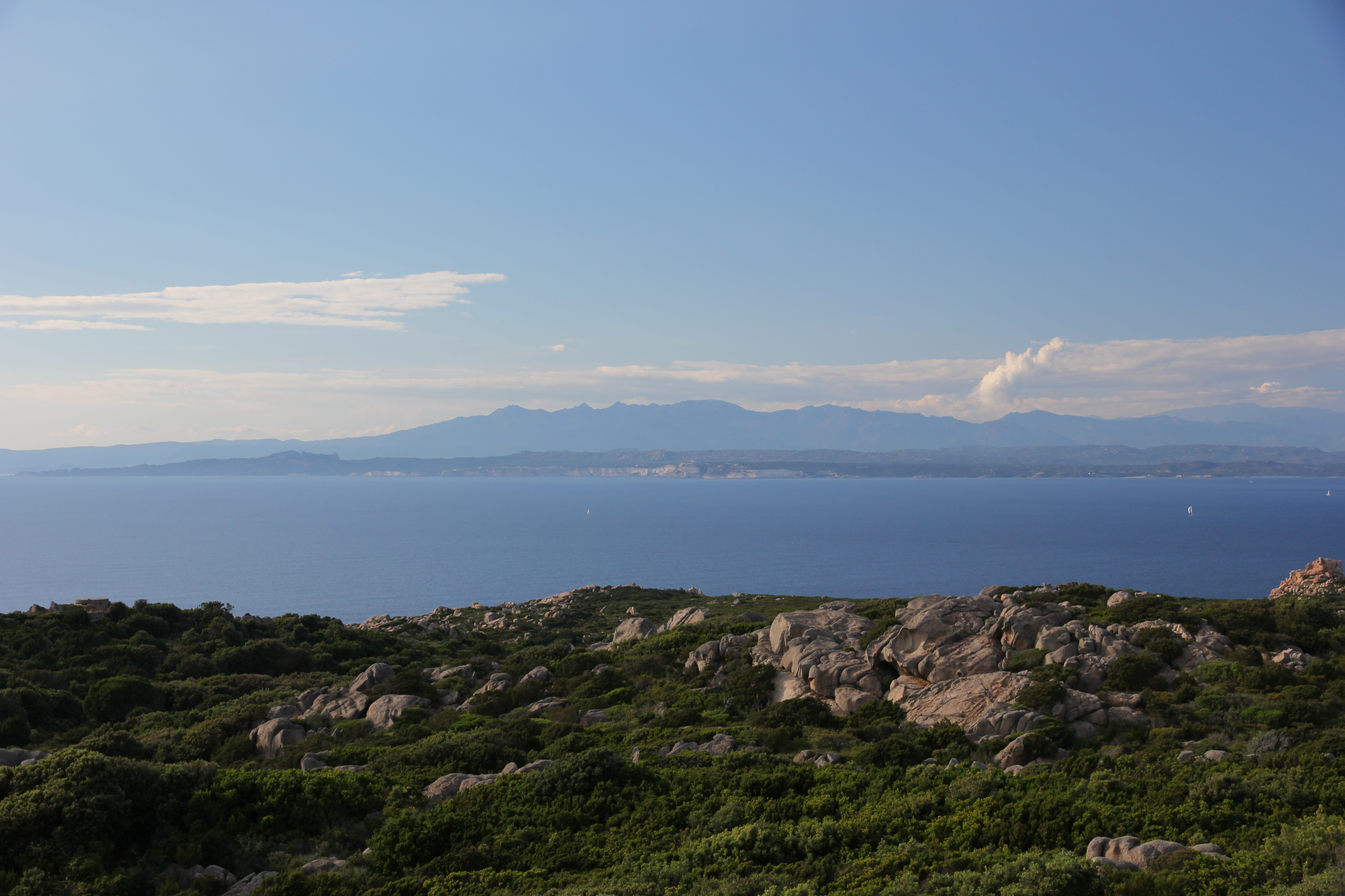 Santa Teresa Gallura - Bocche di Bonifacio